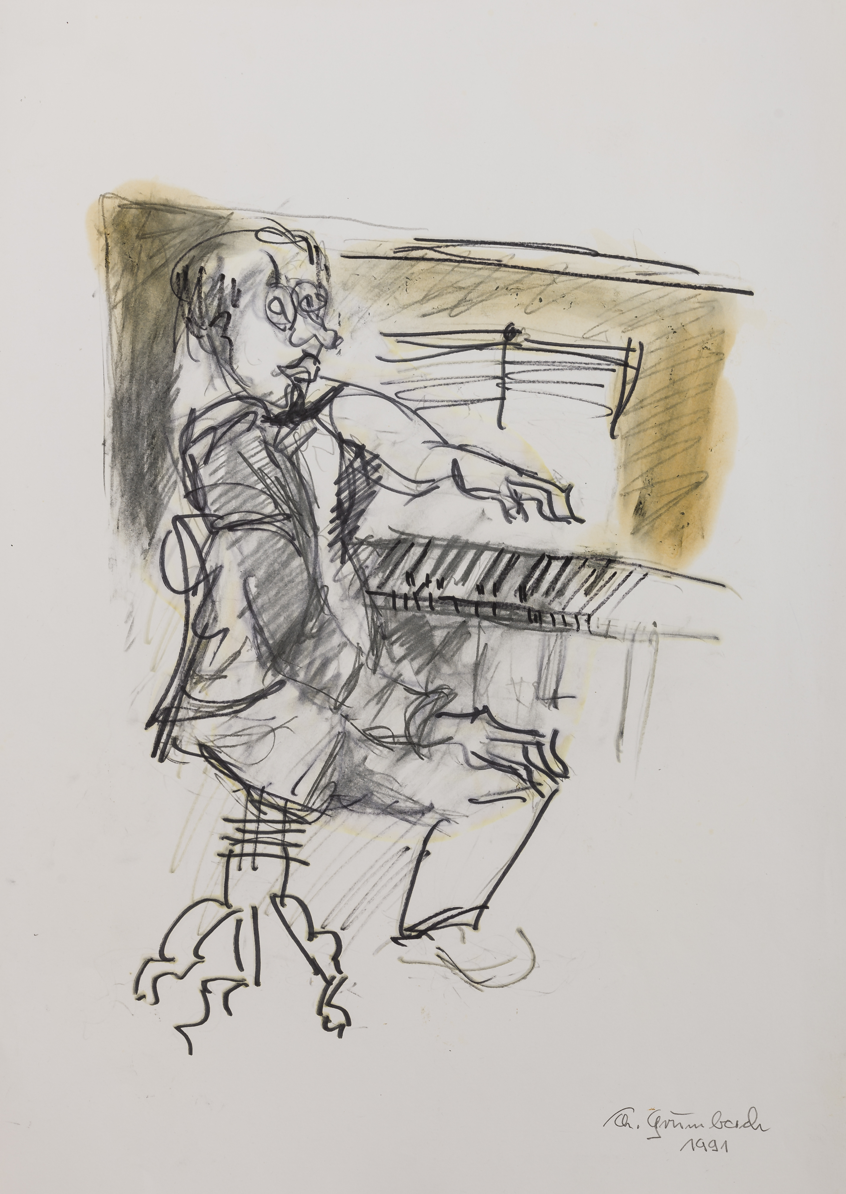 Selbstportrait am Klavier